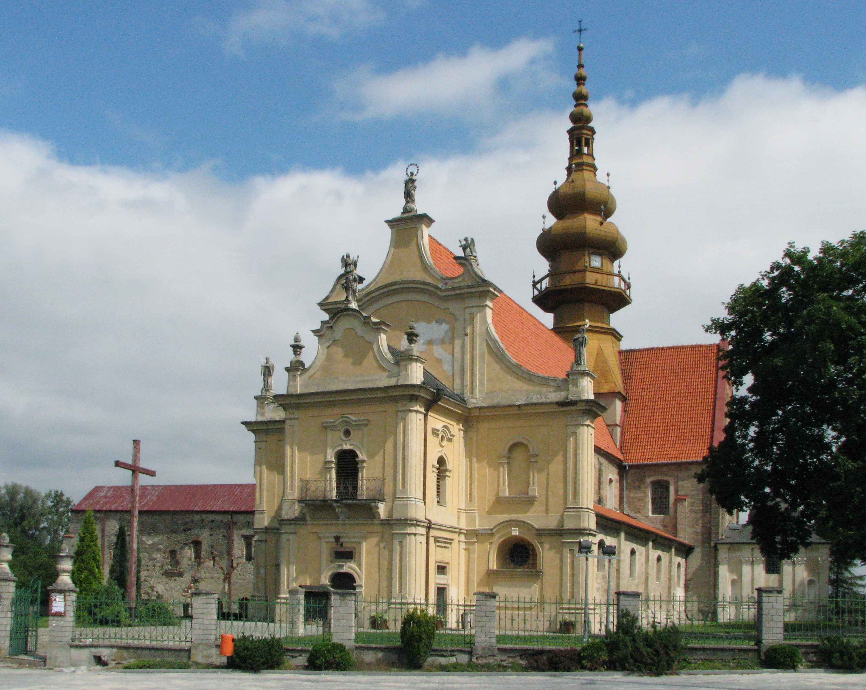 Pocysterski kościół pw. św. Floriana i część zabudowań opactwa (po lewej) w Koprzywnicy, pow. sandomierski, woj. świętokrzyskie, Polska.